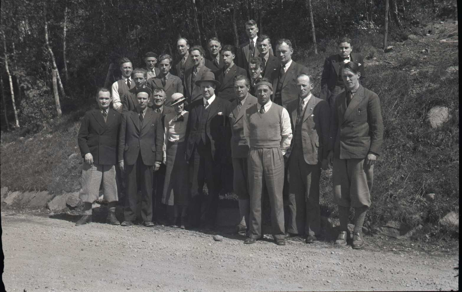 RA/PA-0781/Fi/0007/0930 1230